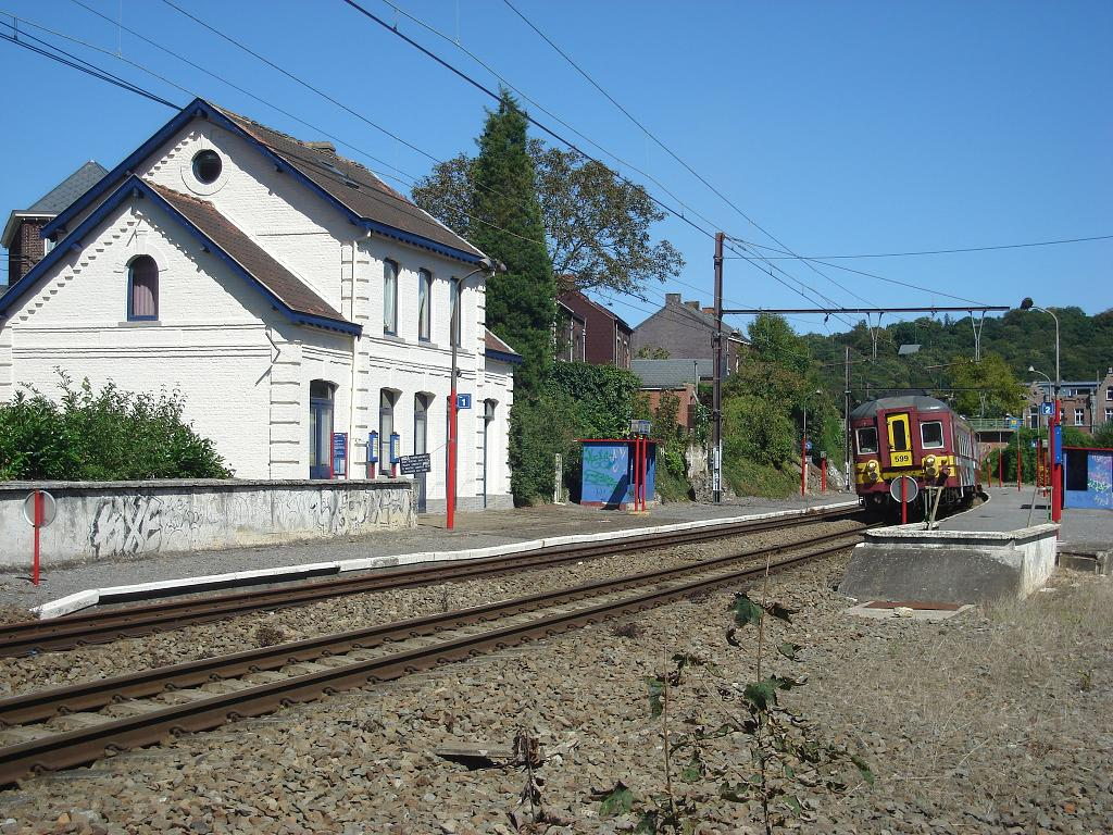 Gare de Landelies sur la ligne 130A Charleroi - Jeumont. En voie 2 se trouve le train L à destination d'Erquelinnes.